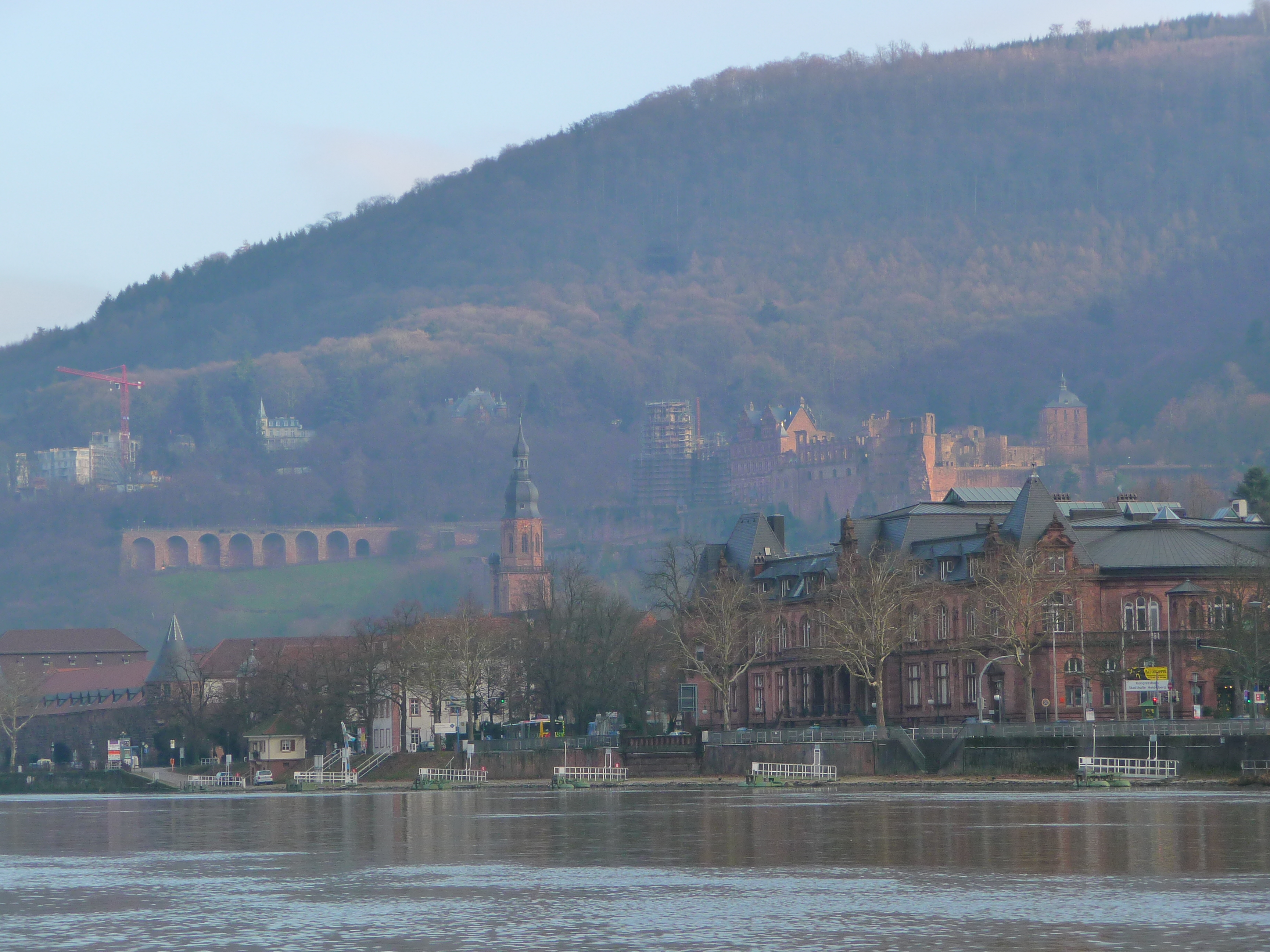 Blick über den Neckar auf Teile der Heidelberger Altstadt